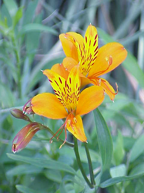 Species: Alstroemieria aurantiaca Family: Alstroemeriaceae Image No. 1